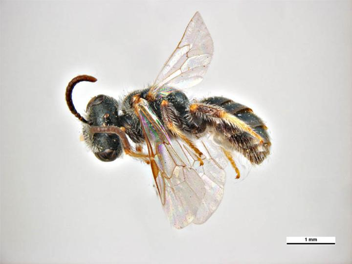 Lasioglossum cephalochilum male